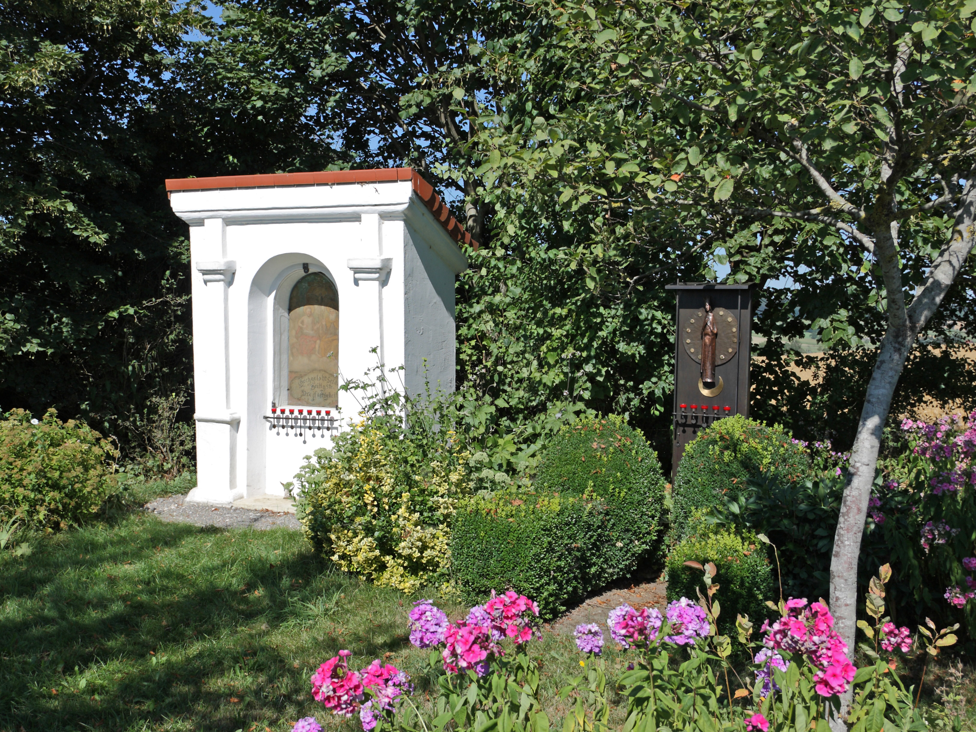 Bildstock nordöstl. Loppenhausen, 18. Jh.; Anlage mit moderner Madonnenfigur ergänzt